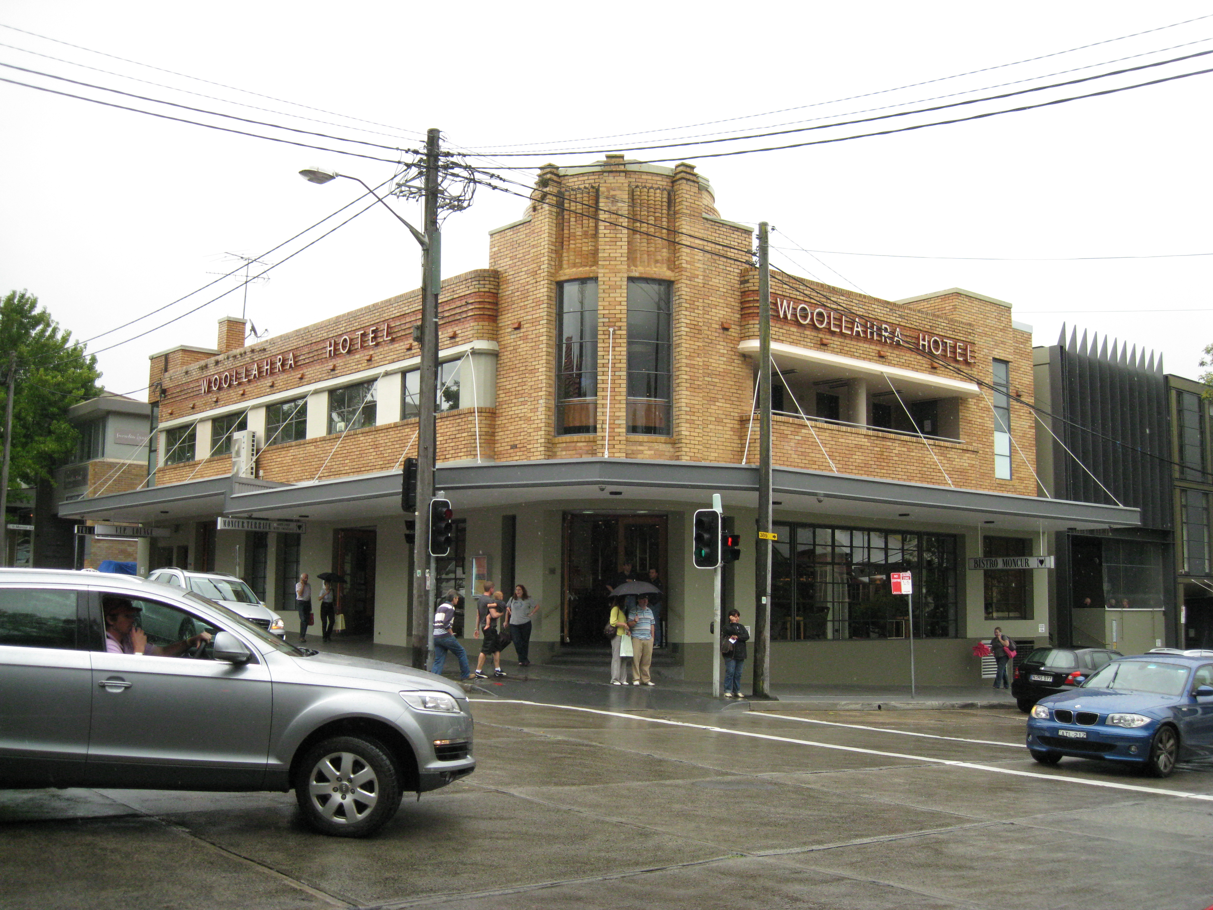 Woollahra Hotel